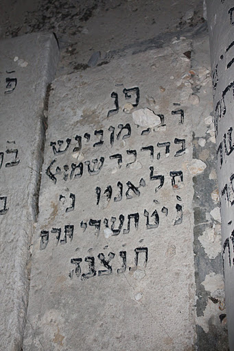 Beinush Salant Grave